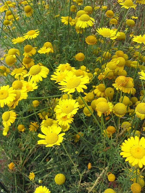 Anthémis des teinturiers. Photo prise au parc botanique de Meise (Belgique) en août 2004, Utilisateur:Jeantosti, GFDL